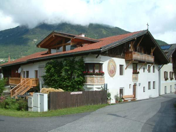 Bauernhaus